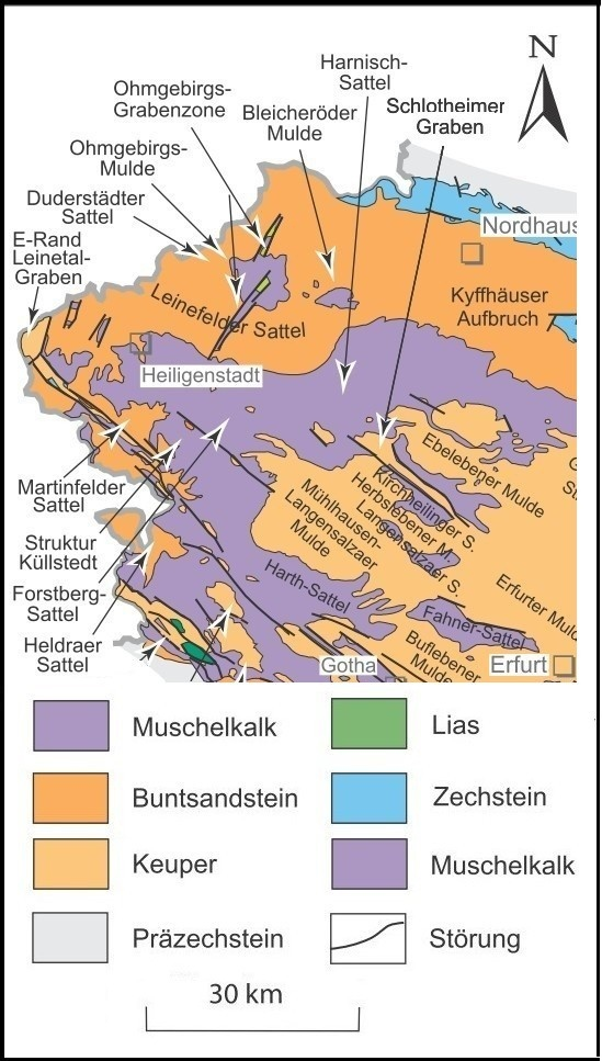 Ausschnittskarte zur geologische Struktur in Nordwestthüringen (nach G. SEIDEL et al. 2002; I. RAPPSILBER 2003; G. SEIDEL 2003, 2004)